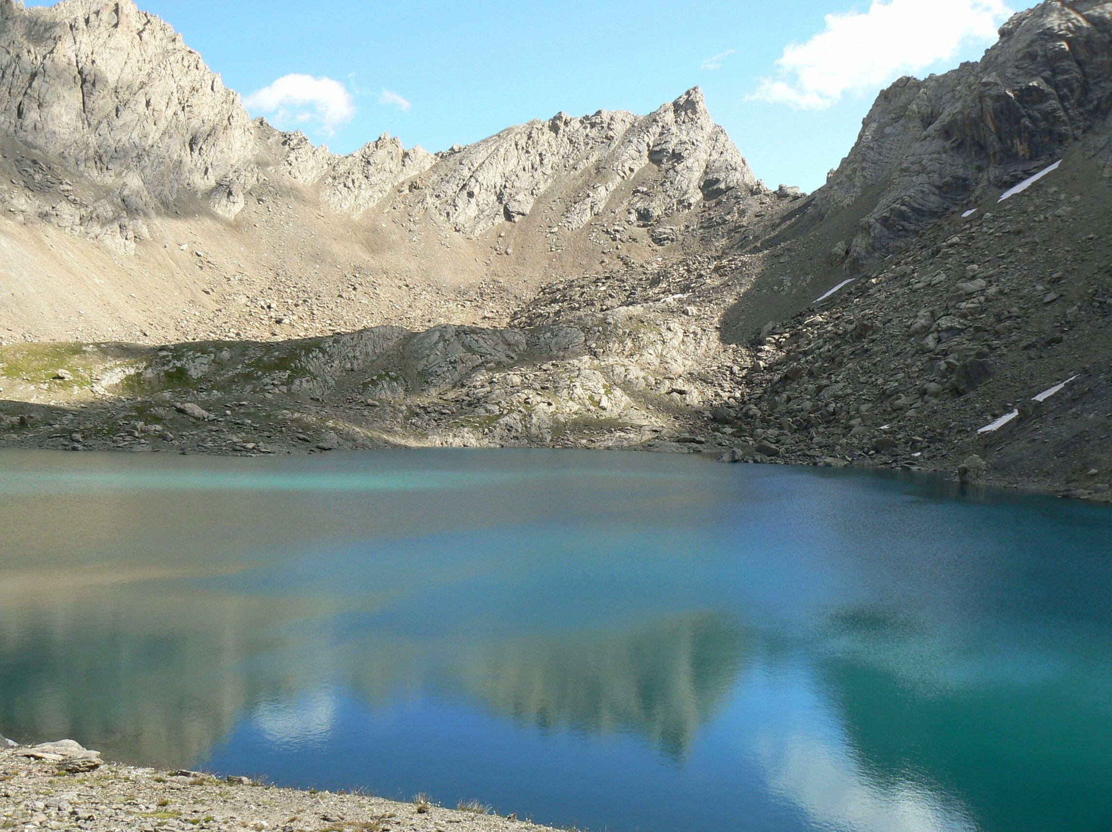 dans le massif du Chambeyron